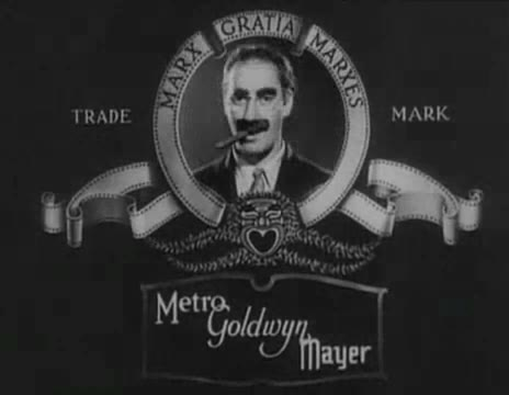 Imatges extretes del Tràiler de la pel·lícula Una nit a l'òpera dels Germans Marx.